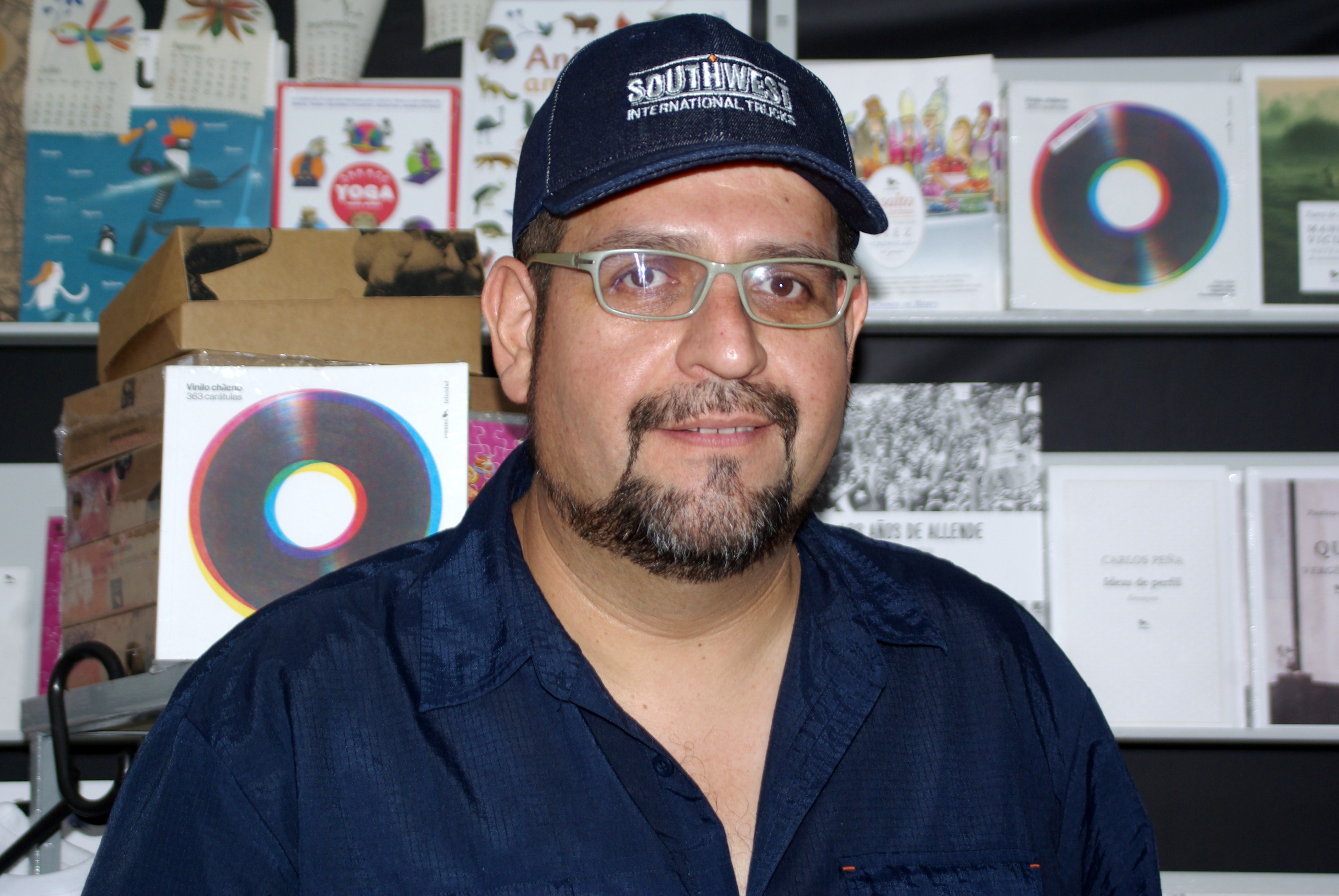 El escritor chileno Patricio Jara en la Feria Internacional del Libro de Santiago 2015